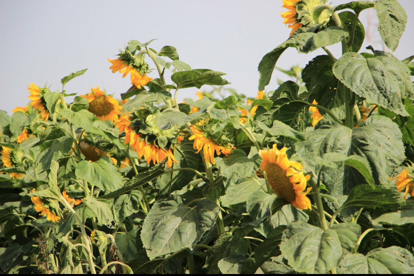 חמניות בסוף העונה